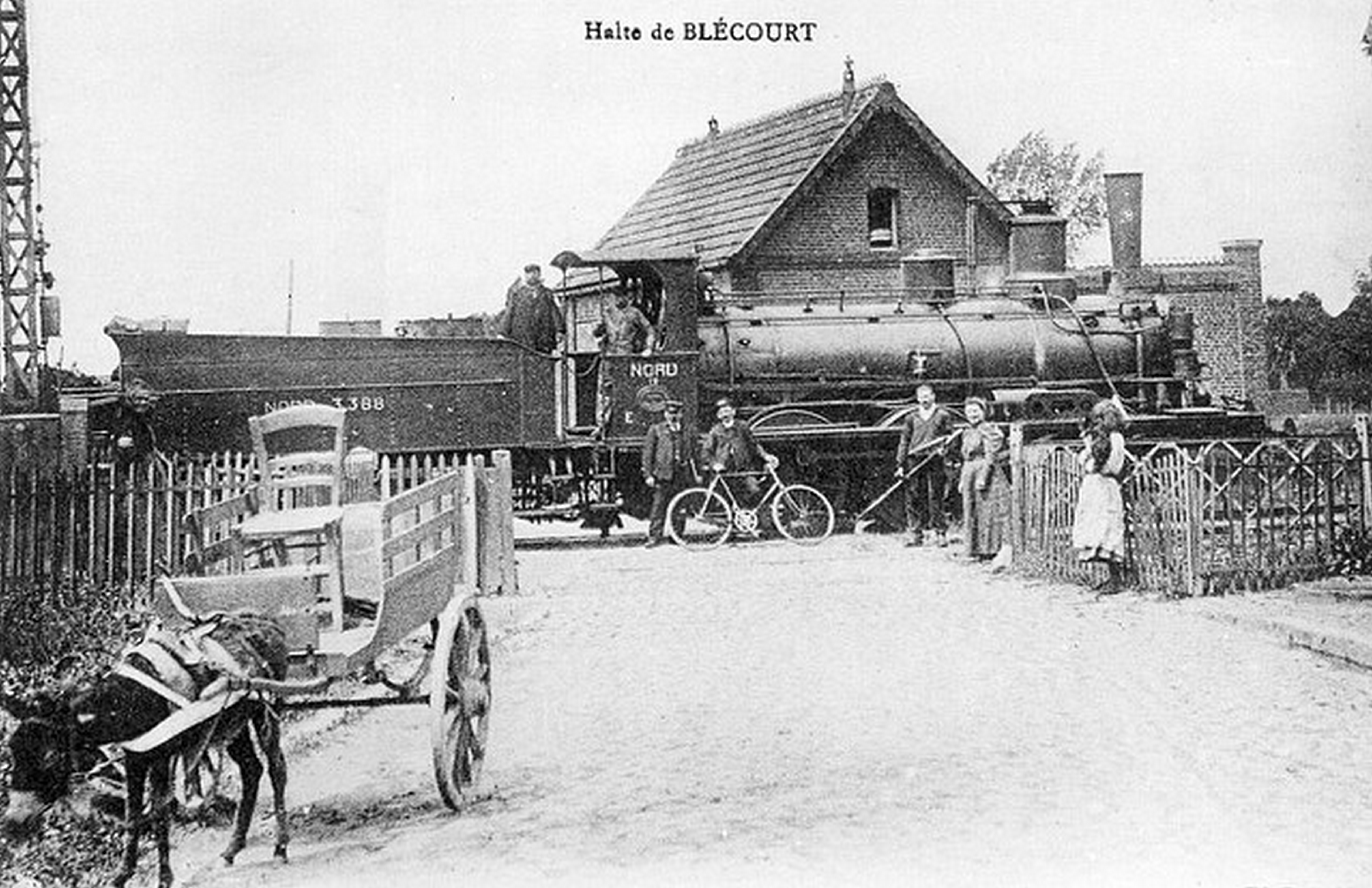 Ancienne halte ferroviaire de Blécourt, Nord, Nord-Pas-de-Calais, France.